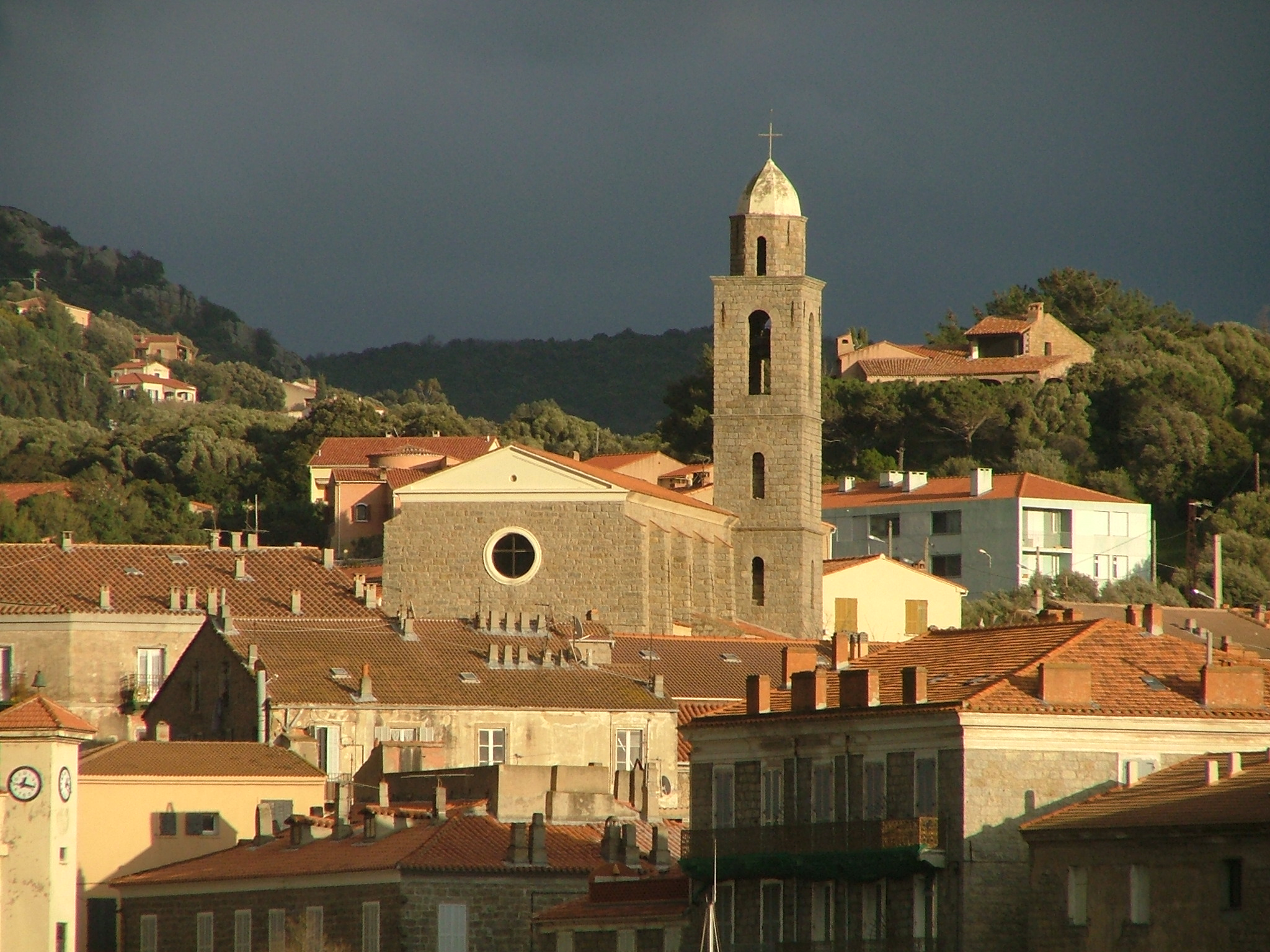 Eglise Notre-Dame de la Miséricorde de Propriano en Corse du Sud